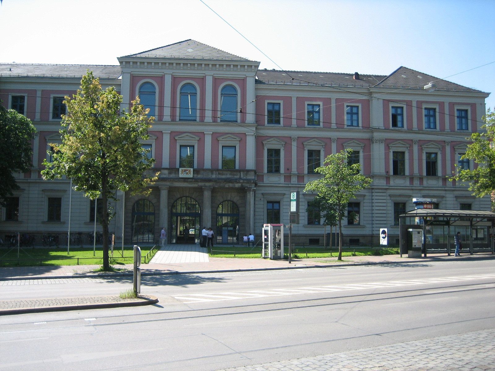 Altes Justizgebäude in Augsburg, am Alten Einlass, Haupteingangsseite